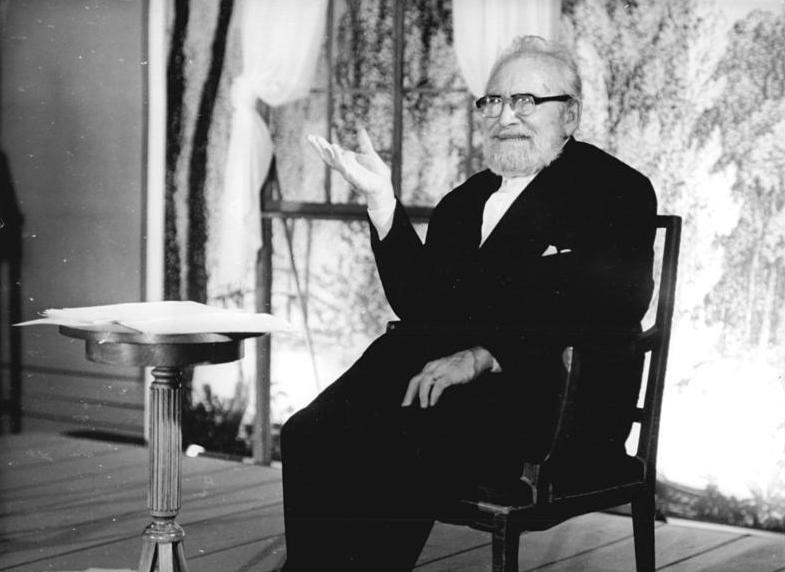 ADN-ZB Weisflog 13.10.79 Berlin: Berliner Festtage Lyrik und Prosa von Johann Wolfgang von Goethe wird Wolfgang Heinz am 16.10.79 im Theater im Palast vortragen.